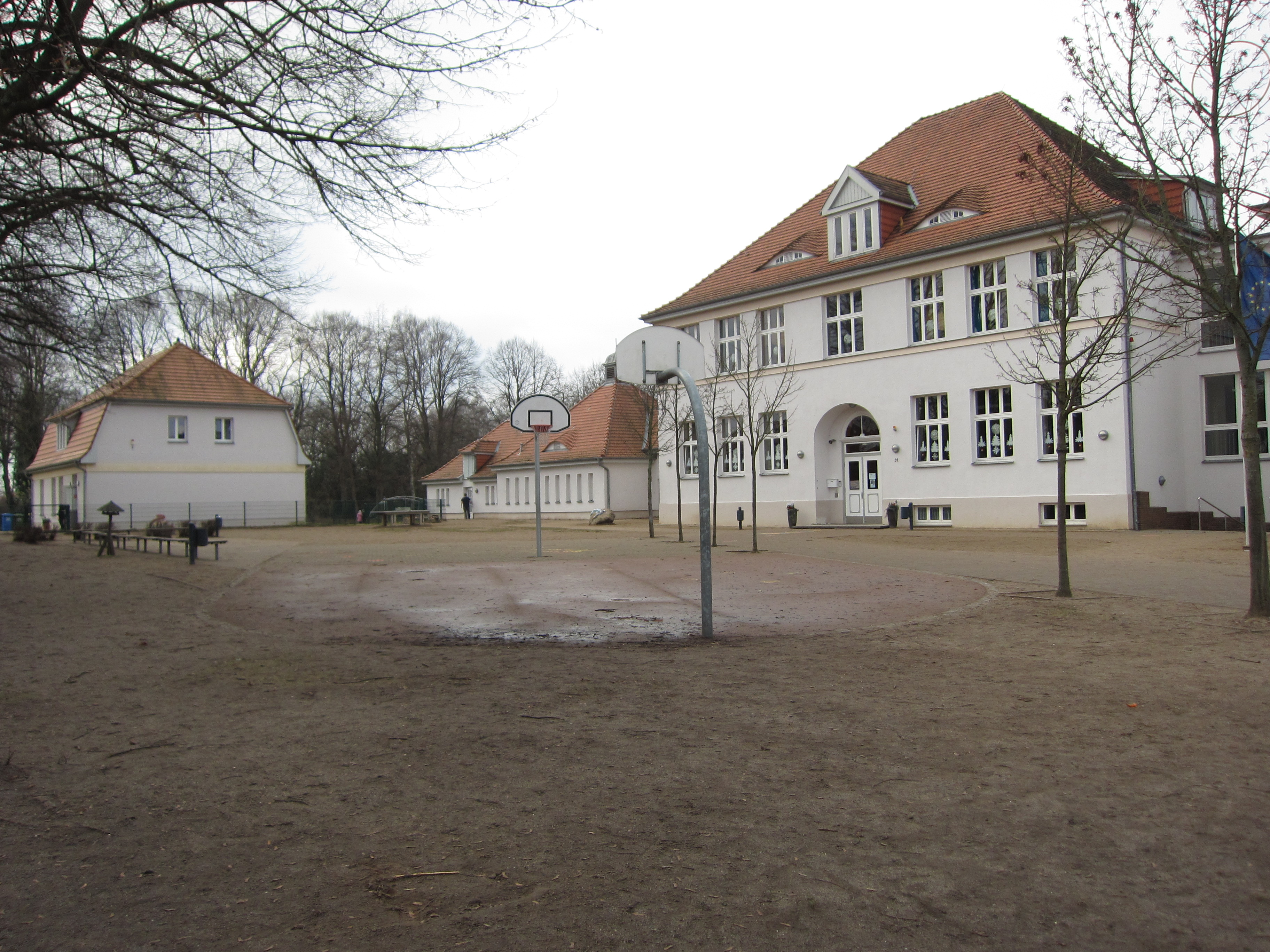 Schule Selmsdorf (Neue Reihe)